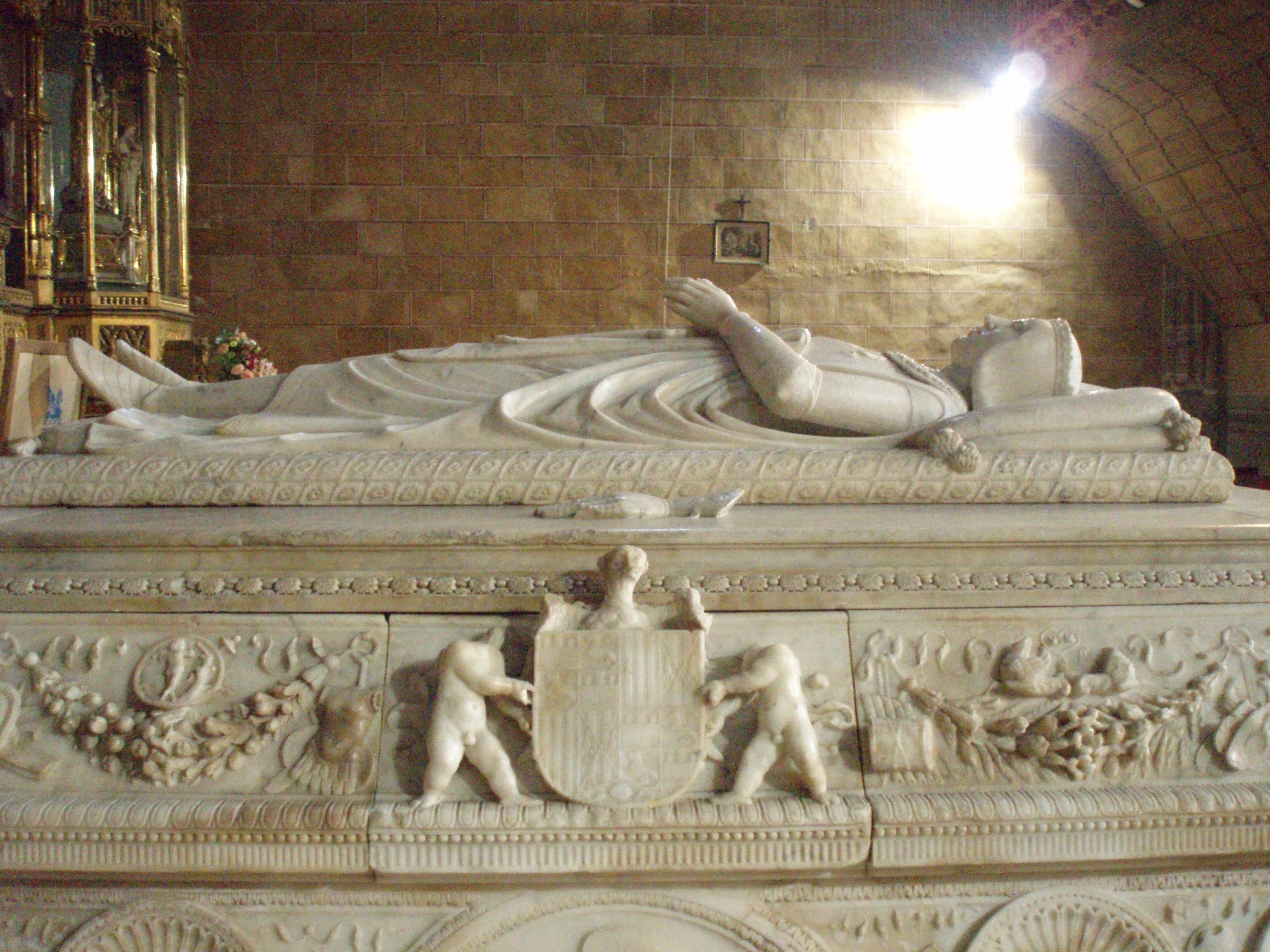 Ávila. Sepulcro del Príncipe Don Juan